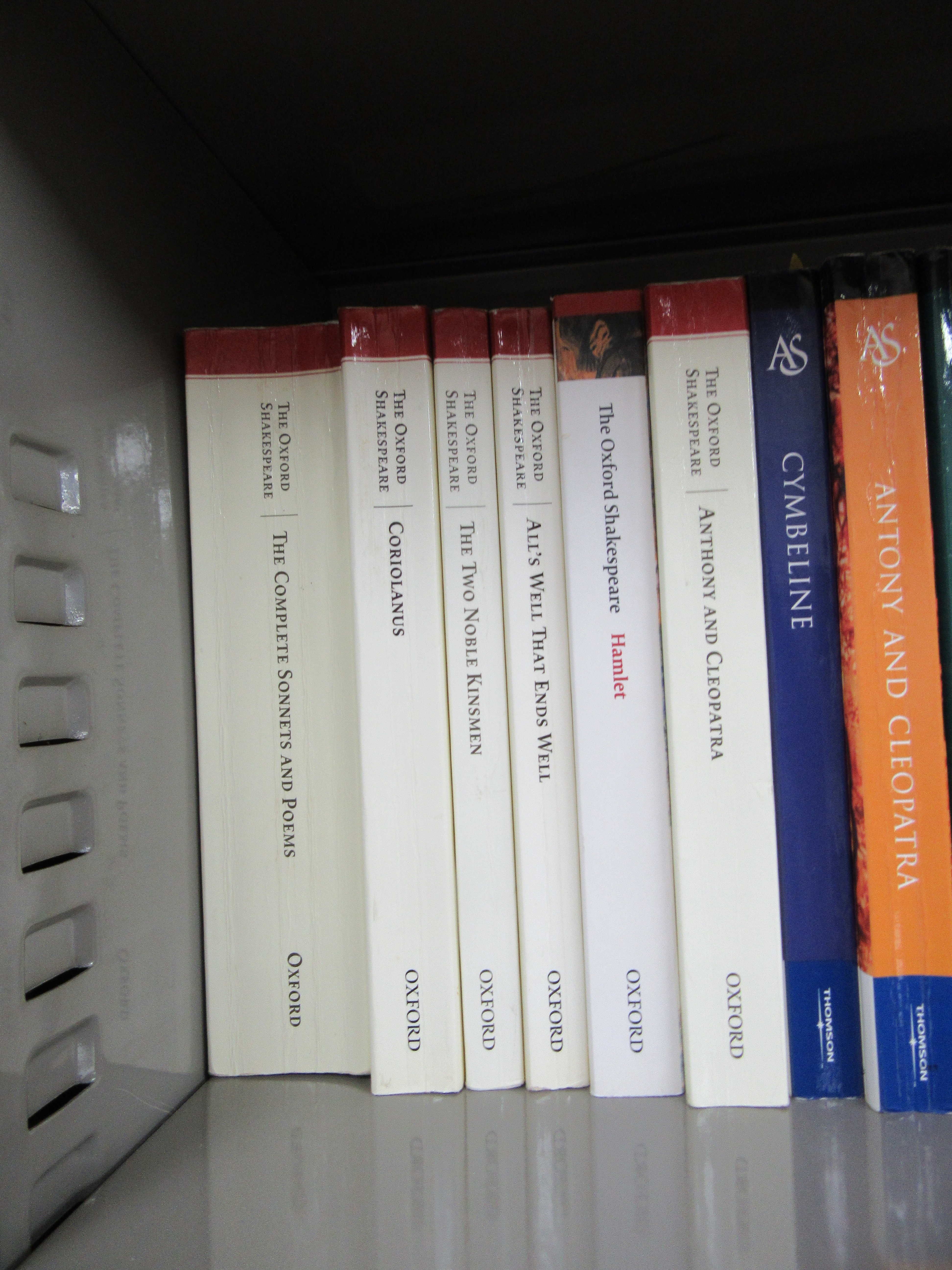 オクスフォード版シェイクスピアの背